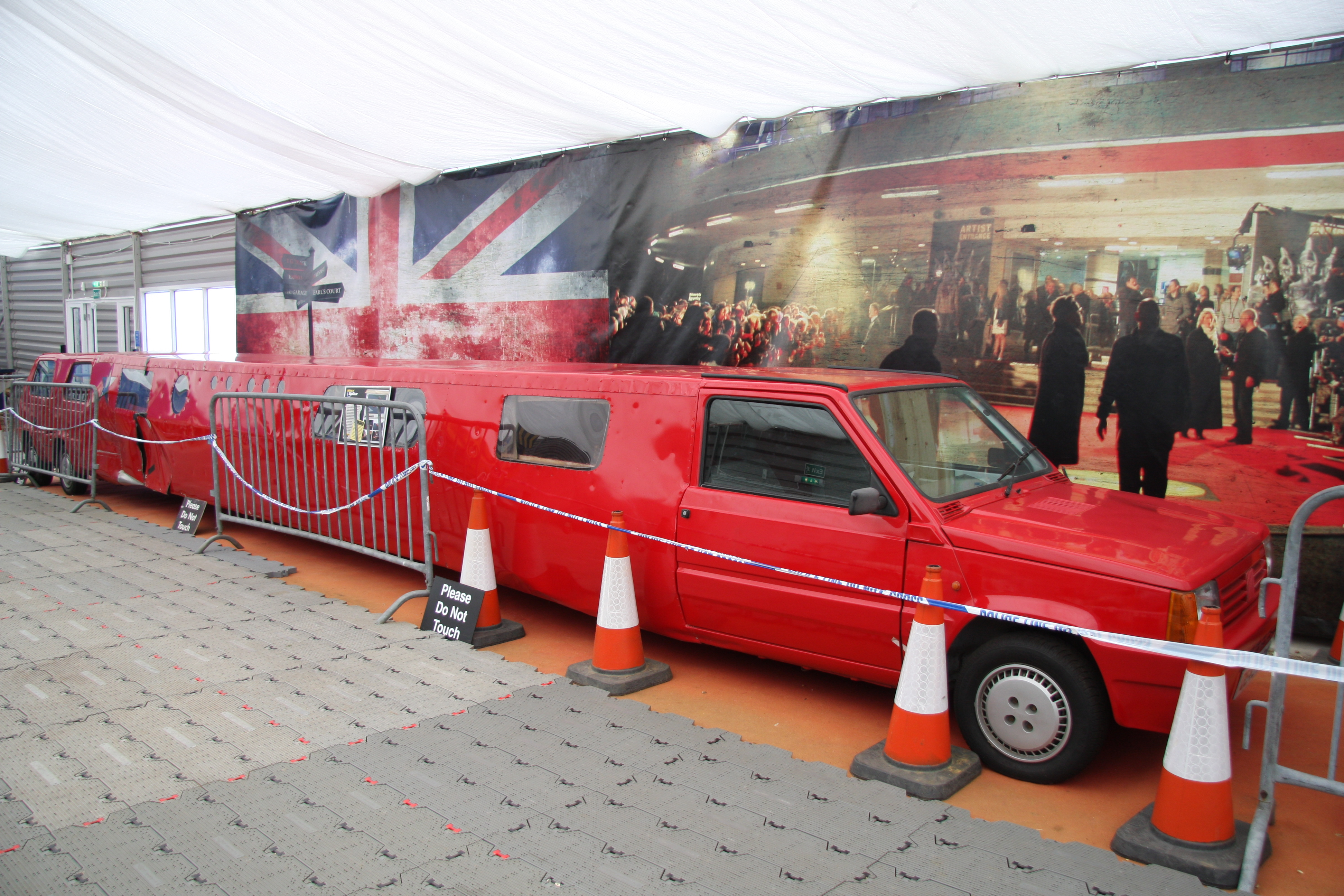 1992 Fiat Panda limo